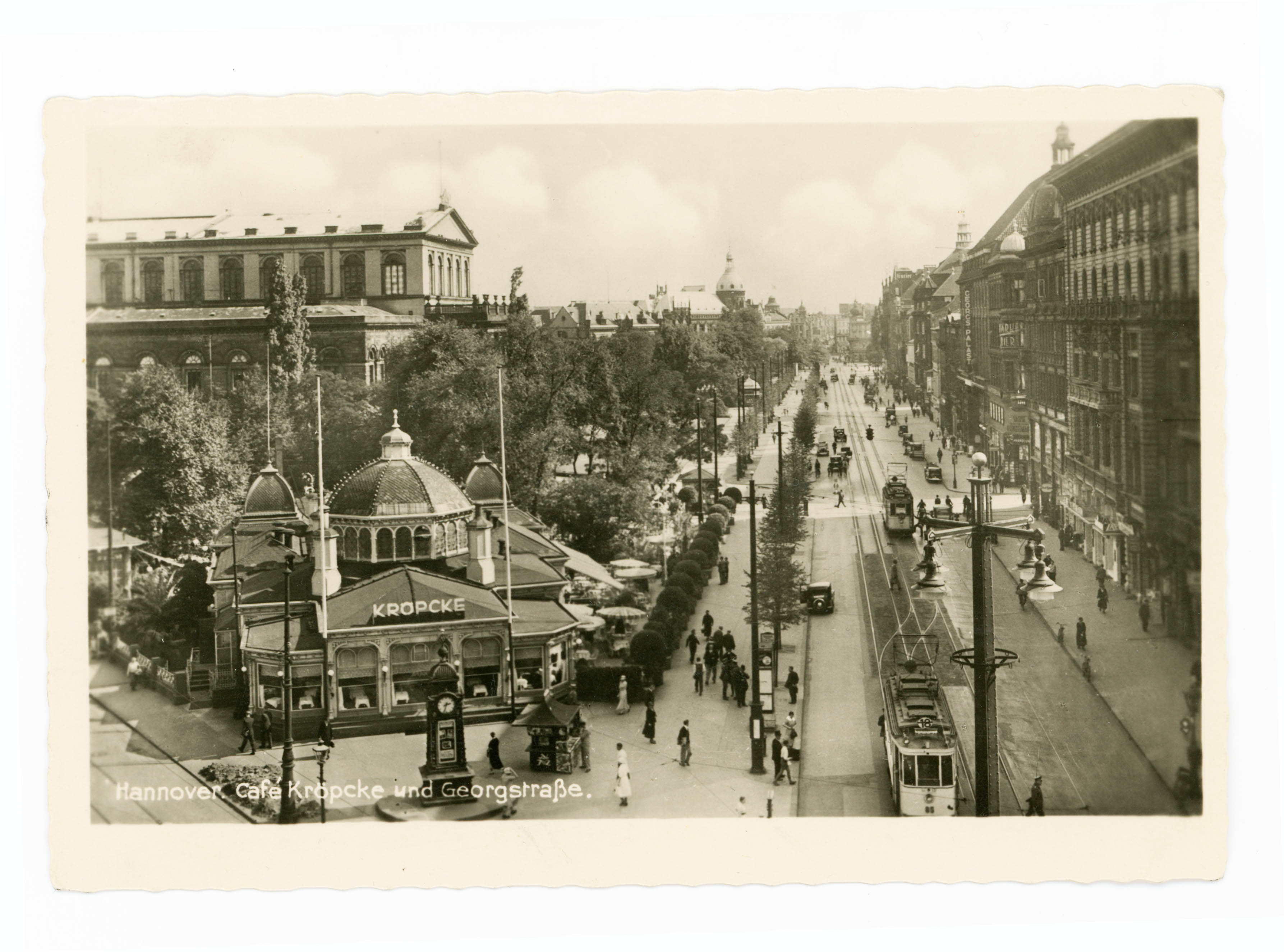 Hannover, Café Kröpcke mit Blick auf Opernhaus und Georgstraße